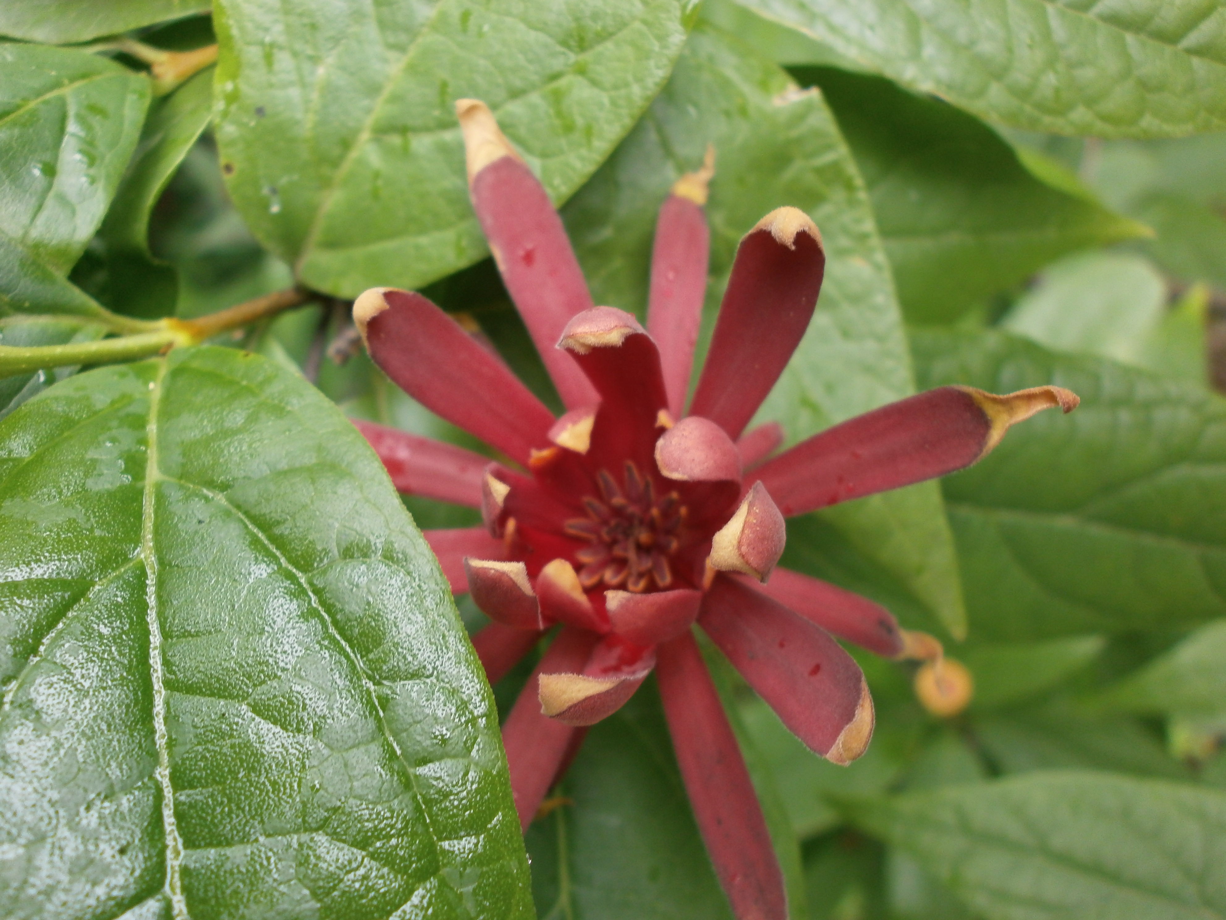 Calycanthus floridus virága